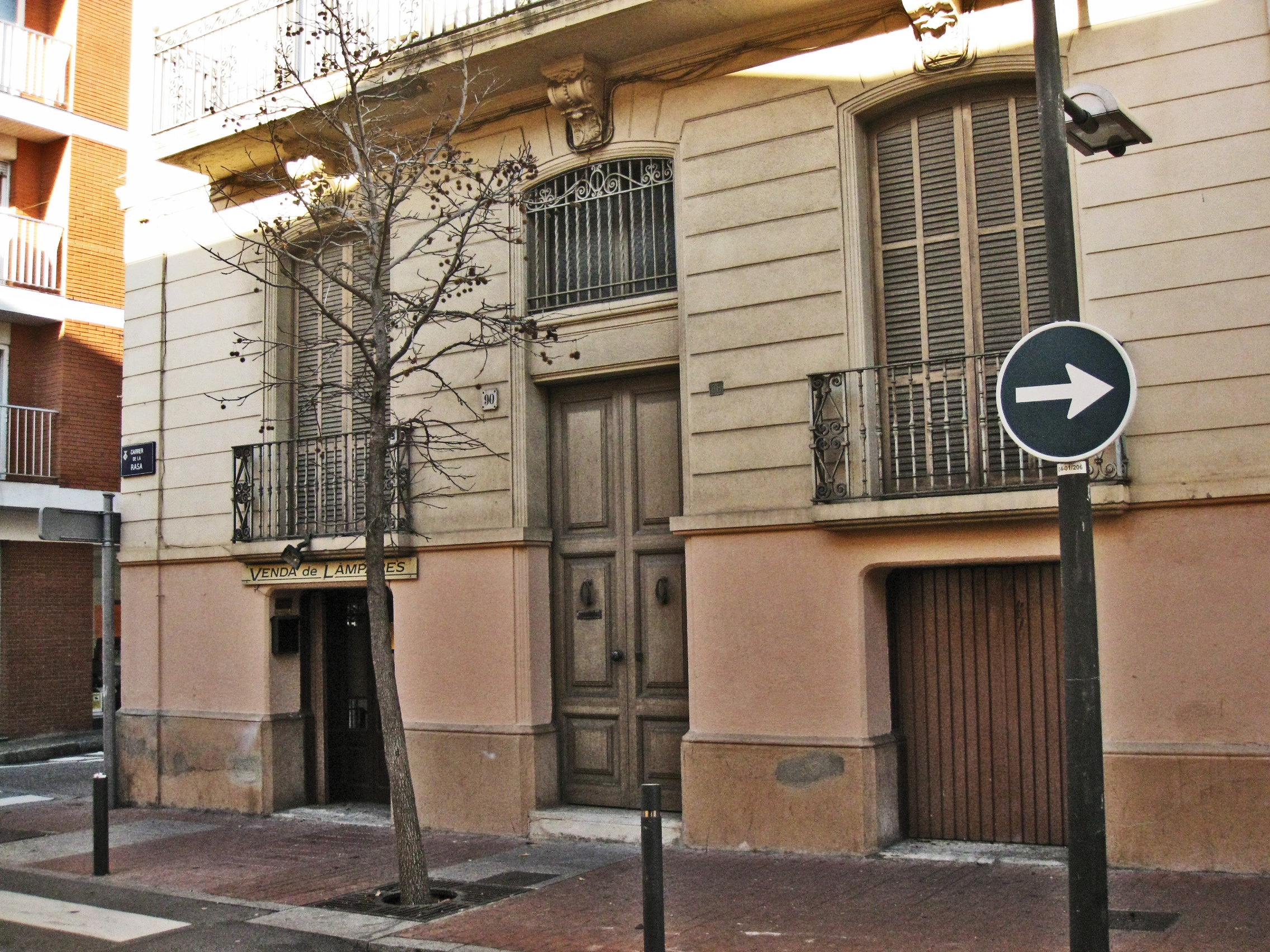 Casa Gaietà Galítzia, obra de Lluís Muncunill de 1930, a la cantonada entre els carrers de la Rasa i de la Indústria (Terrassa).